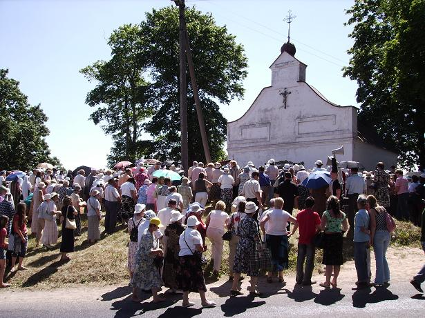 Tikinčiųjų procesija eina Kalvarijos Kalnus. 2006 m.